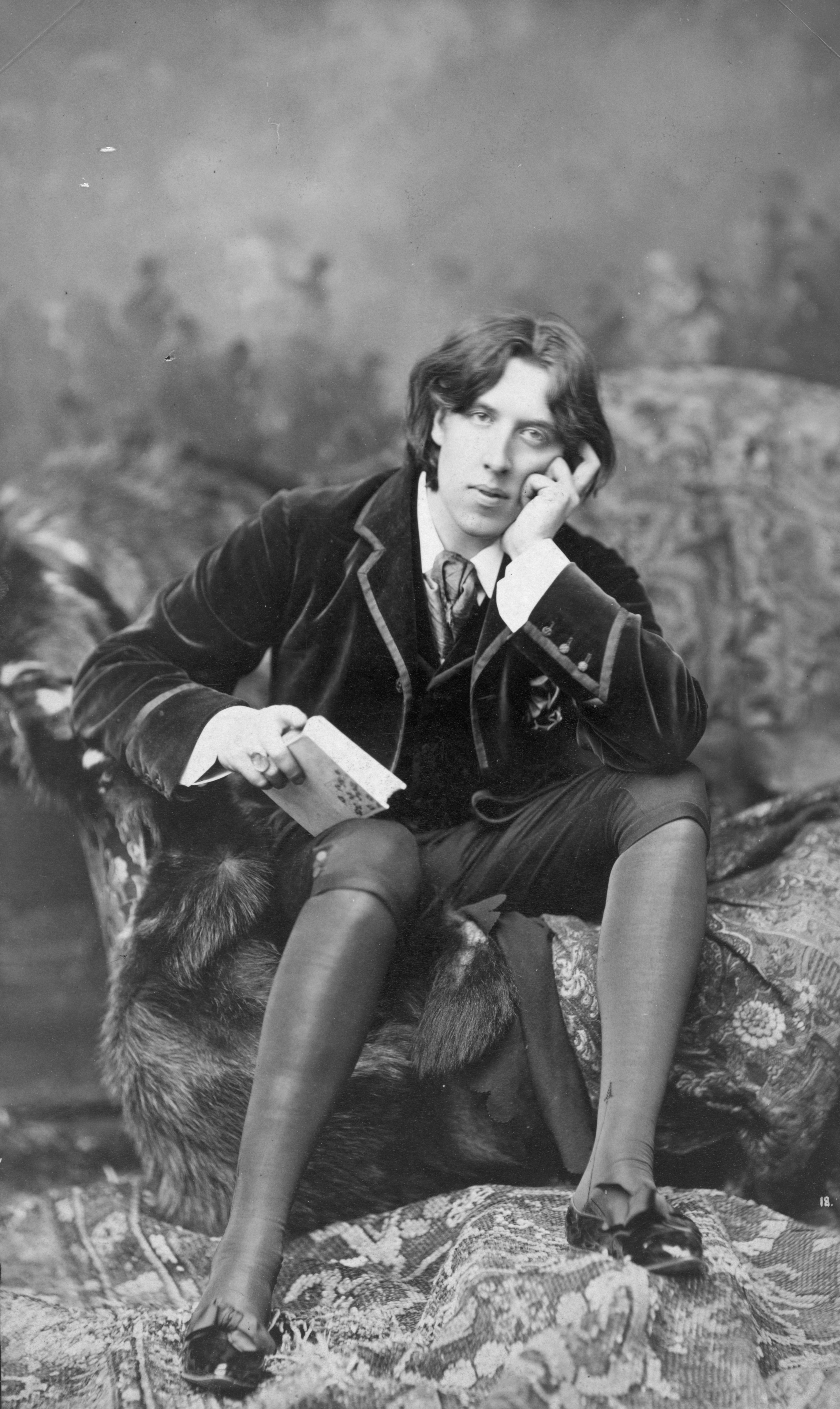 Portrait of Oscar Wilde Výstavu připravilo Musée de l’Elysée, Lausanne Napoléon Sarony (1821-1896) Portrét Oscara Wildea, 1882 Digitální tisk dle originálu uloženého v Kongresové knihovně ve Washingtonu, D.C. Musée de l’Élysée, Lausanne Napoléon Sarony (1821-1896) Portrait of Oscar Wilde, 1882 Digital print from the original in the Library of Congress, Washington D.C.